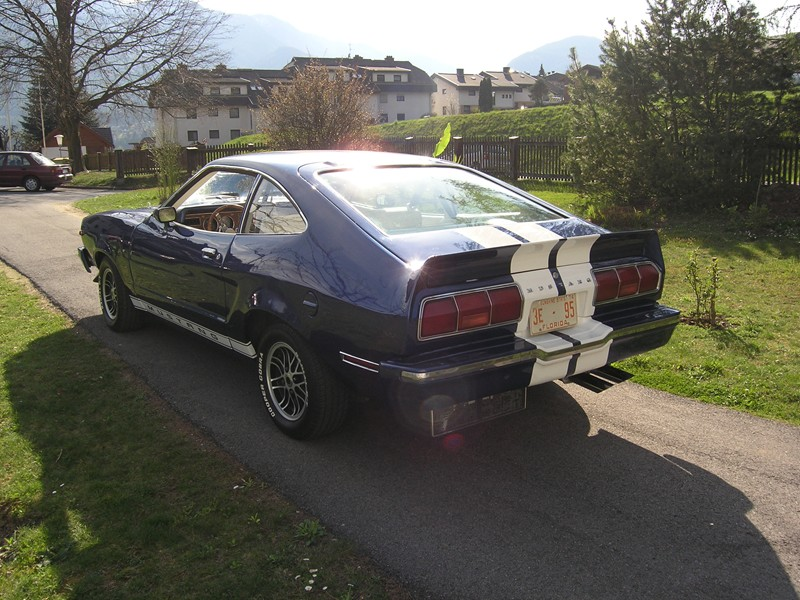 Mustang 74 Rear